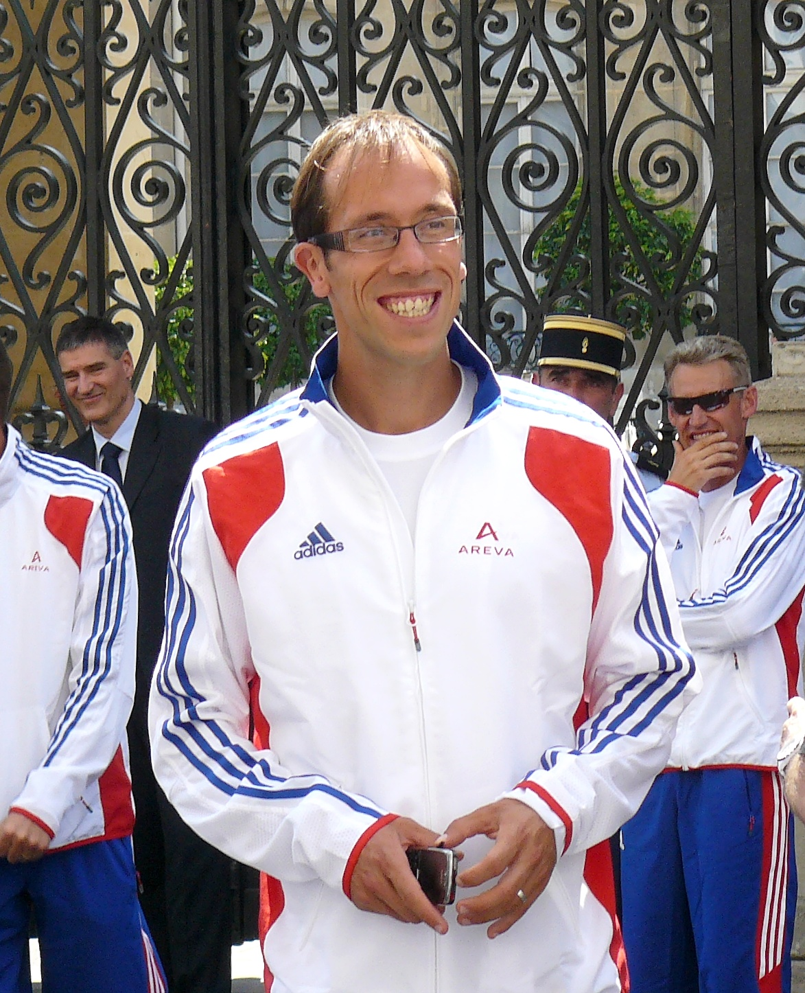 Yohann Diniz, athlète français (marche), lors de la réception des médaillés de Barcelone à l'Élysée, le 3 août 2010.